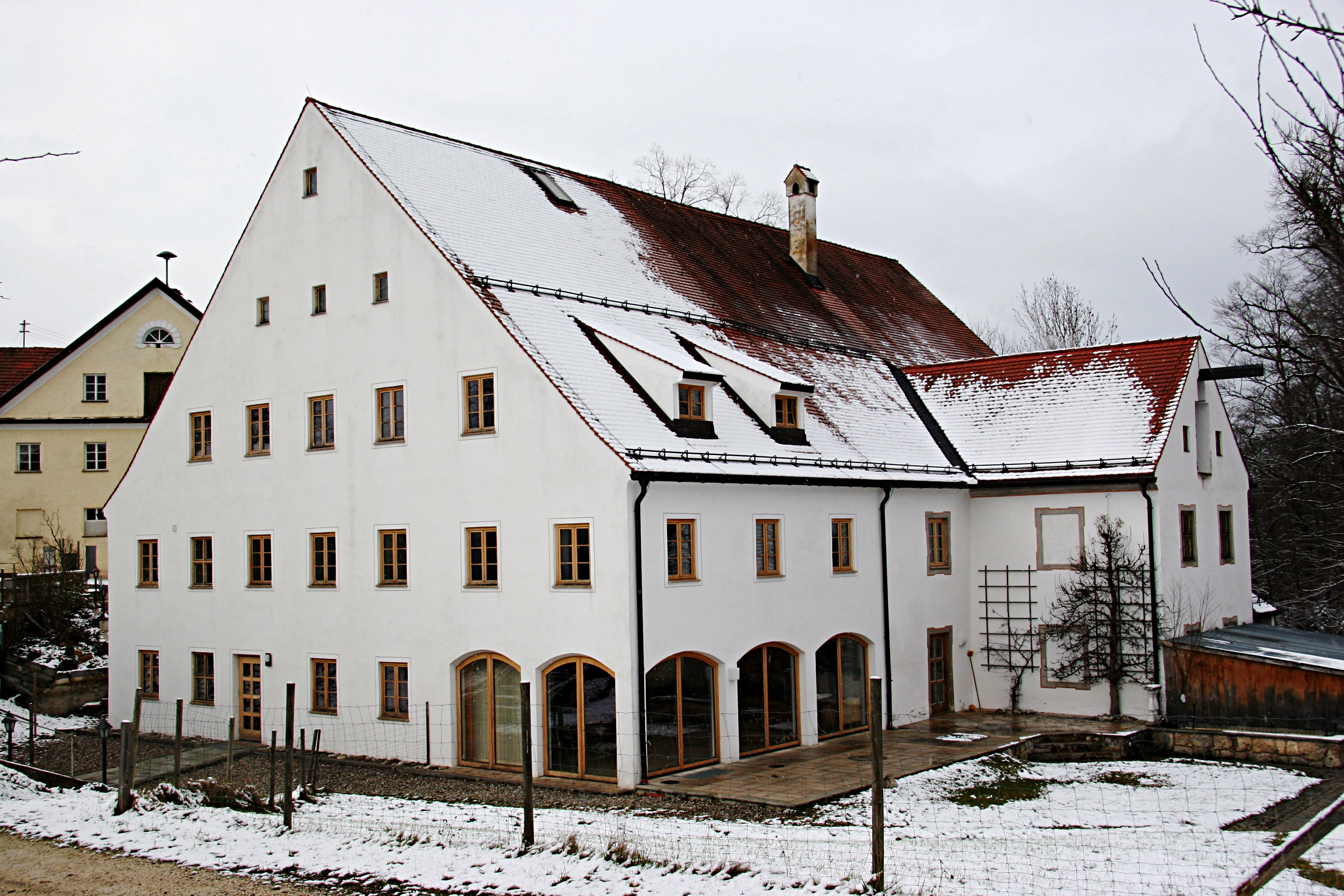 Zweigeschossiger Bau mit Steilsatteldach und zwei Bodenerkern an den Ecken der Nordfassade, mittelalterlicher Kernbau im 16. Jahrhundert erweitert, seit 1778 zum sogenannten Alten Schloss ausgestaltet, dabei 1895 Teilabbrüche, seit 1987 Einrichtung als Orgelmuseum